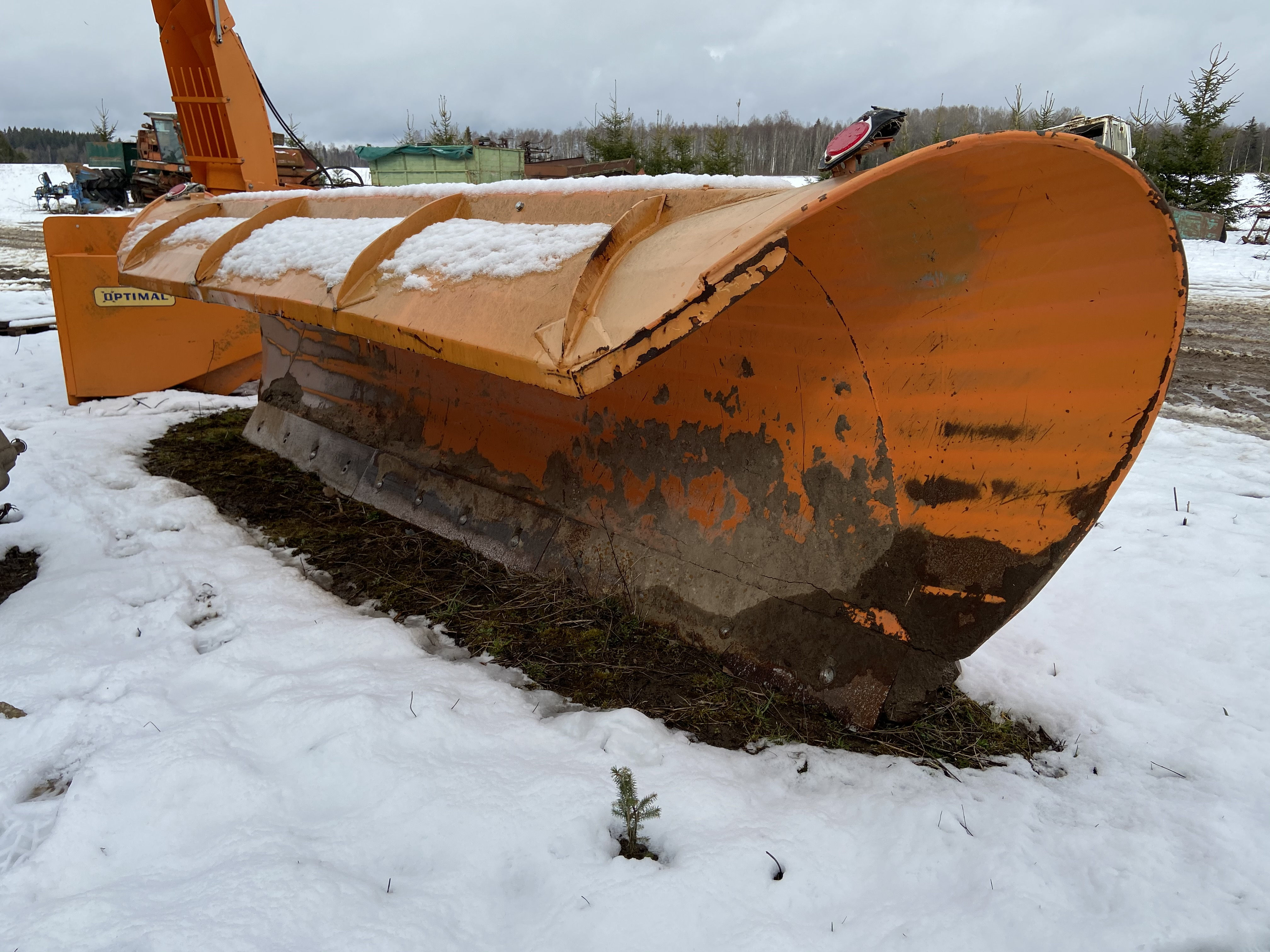 Lumesahk mis kinnitub traktori külge